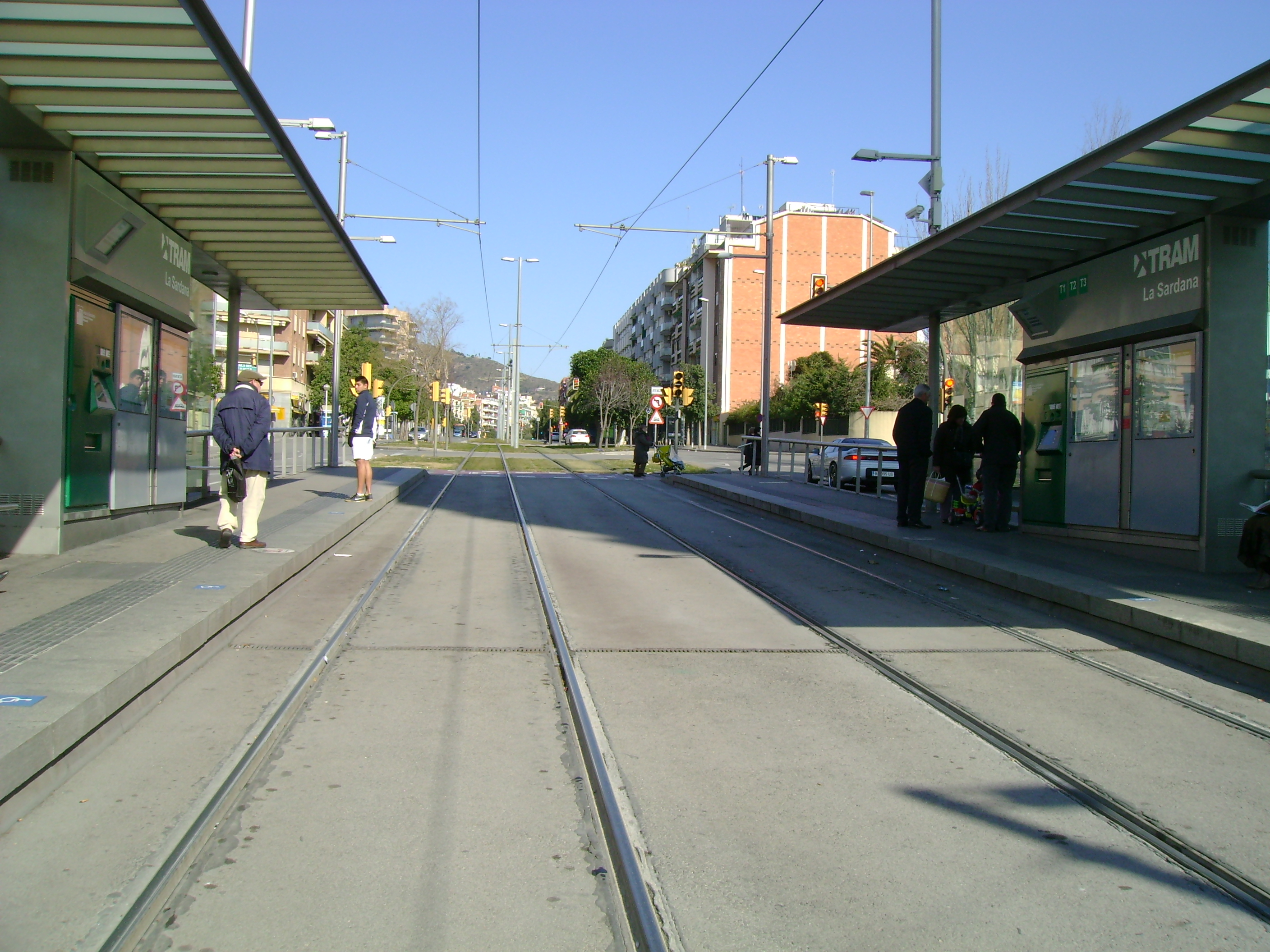 Foto capturada per la meva càmara a l'estació de la Sardana (Trambaix).